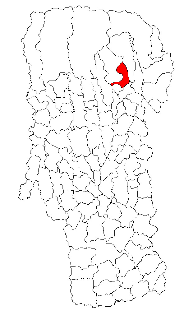 Categorie:Hărţi ale judeţului Argeş